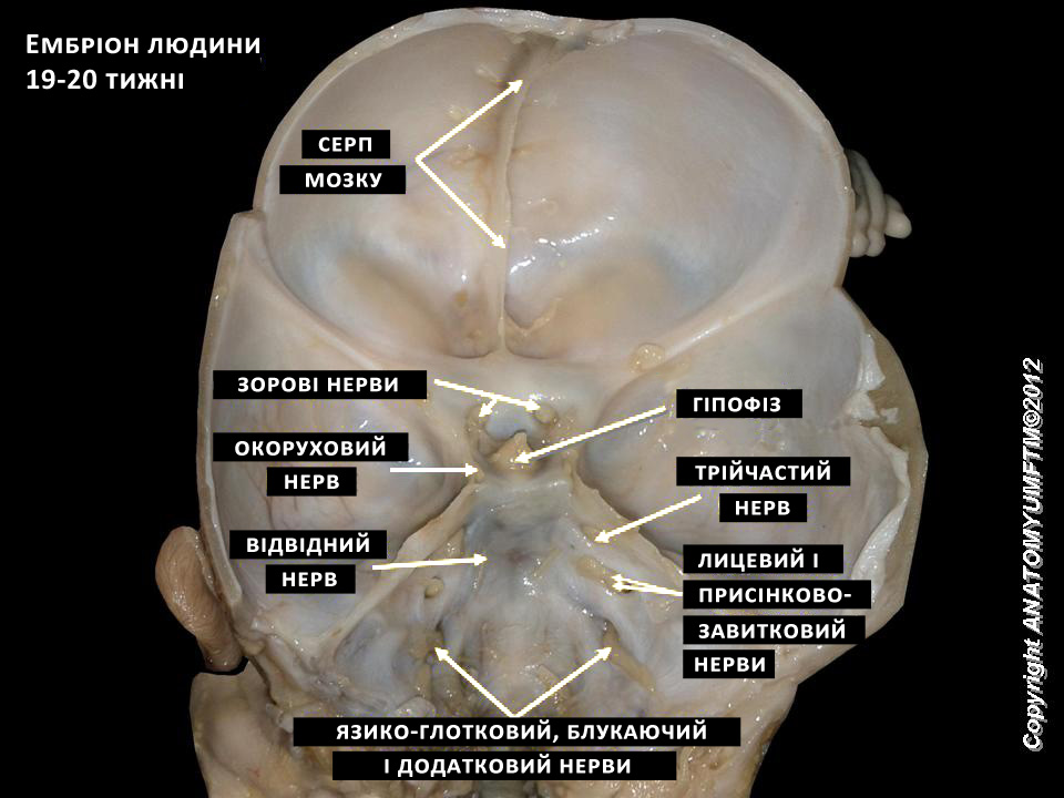 мозок зародка людини